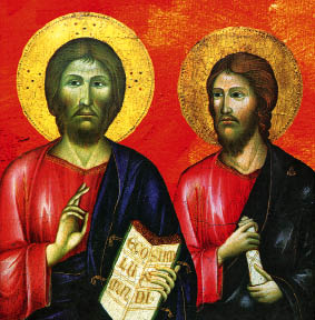 Ikona Isusa (levo) i njegovog mlađeg brata Jakova, koji su predstavljeni kao blizanci.